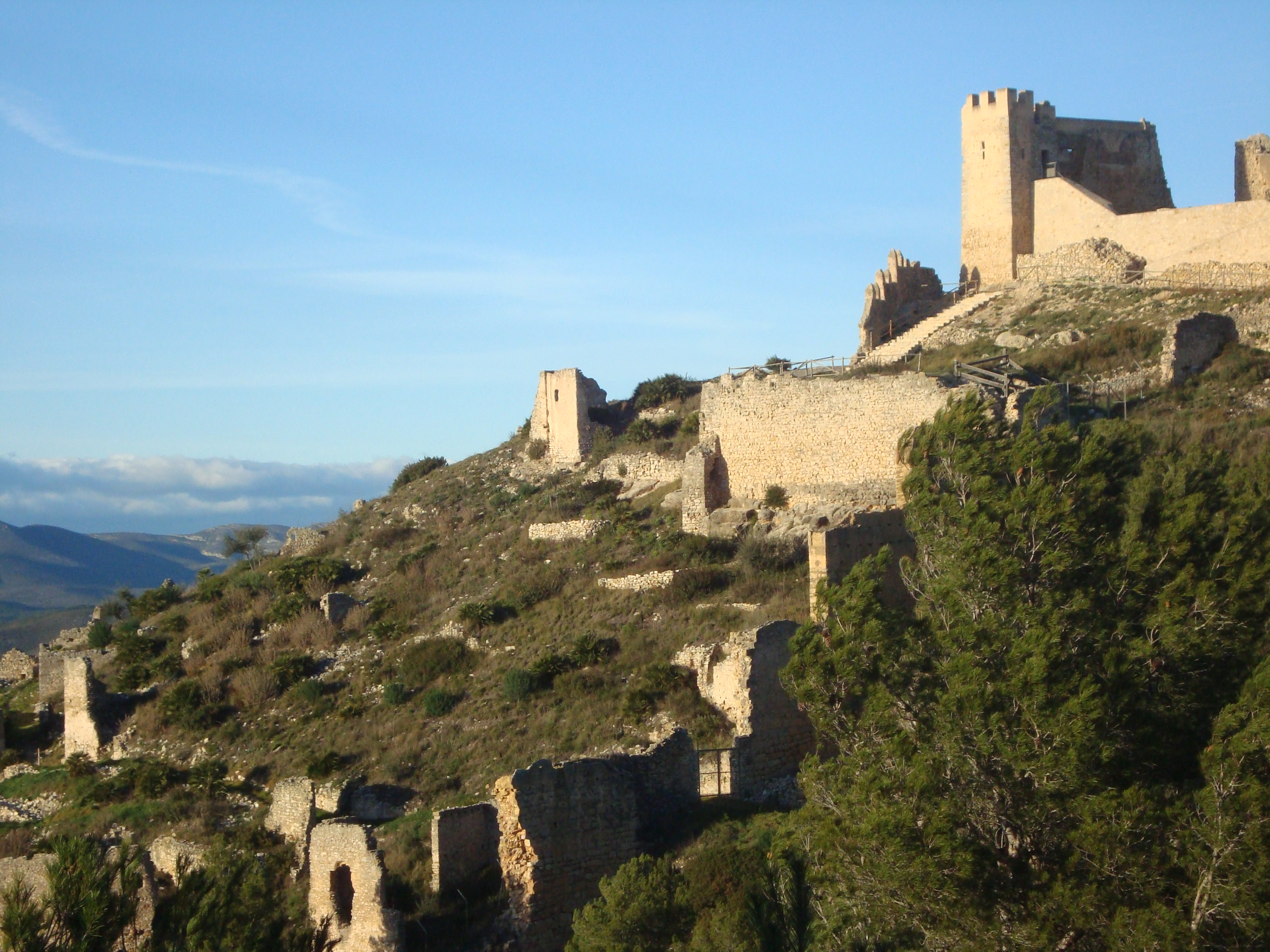 El Castillo de Chivert es una antigua fortaleza medieval emplazada en la cima de un monte dominando el llano de la Foia o valle de Alcalà y la sierra de Irta. Conserva dos partes constructivas bien diferenciadas: la árabe y la cristiana, son dos castillos en uno. La construcción árabe comprende el recinto amurallado externo, obra de los siglos X–XI en la que destacan algunos grandes lienzos en tapial, con remates de merlones y que se abría por la puerta del Albácar. En su interior, se descubren todavía buenas muestras de arquitectura doméstica musulmana. Muy interesante es la inscripción árabe en uno de sus muros cuya traducción viene a decir "para el reencuentro con Dios". En la parte más alta del castillo islámico se construyó la fortaleza templaria, del siglo XIII.